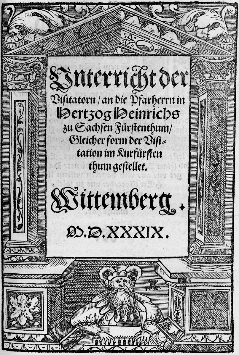 Philipp Melachnthon: Unterricht der Visitatorn, an die Pfarherrn in Hertzog Heinrichs zu Sachsen Fürstenthum, Gleicher form der Visitation im Kurfürstenthum gestellet, Holzschnitt-Bordüre von Lucas Cranach d. J., Wittenberg 1539